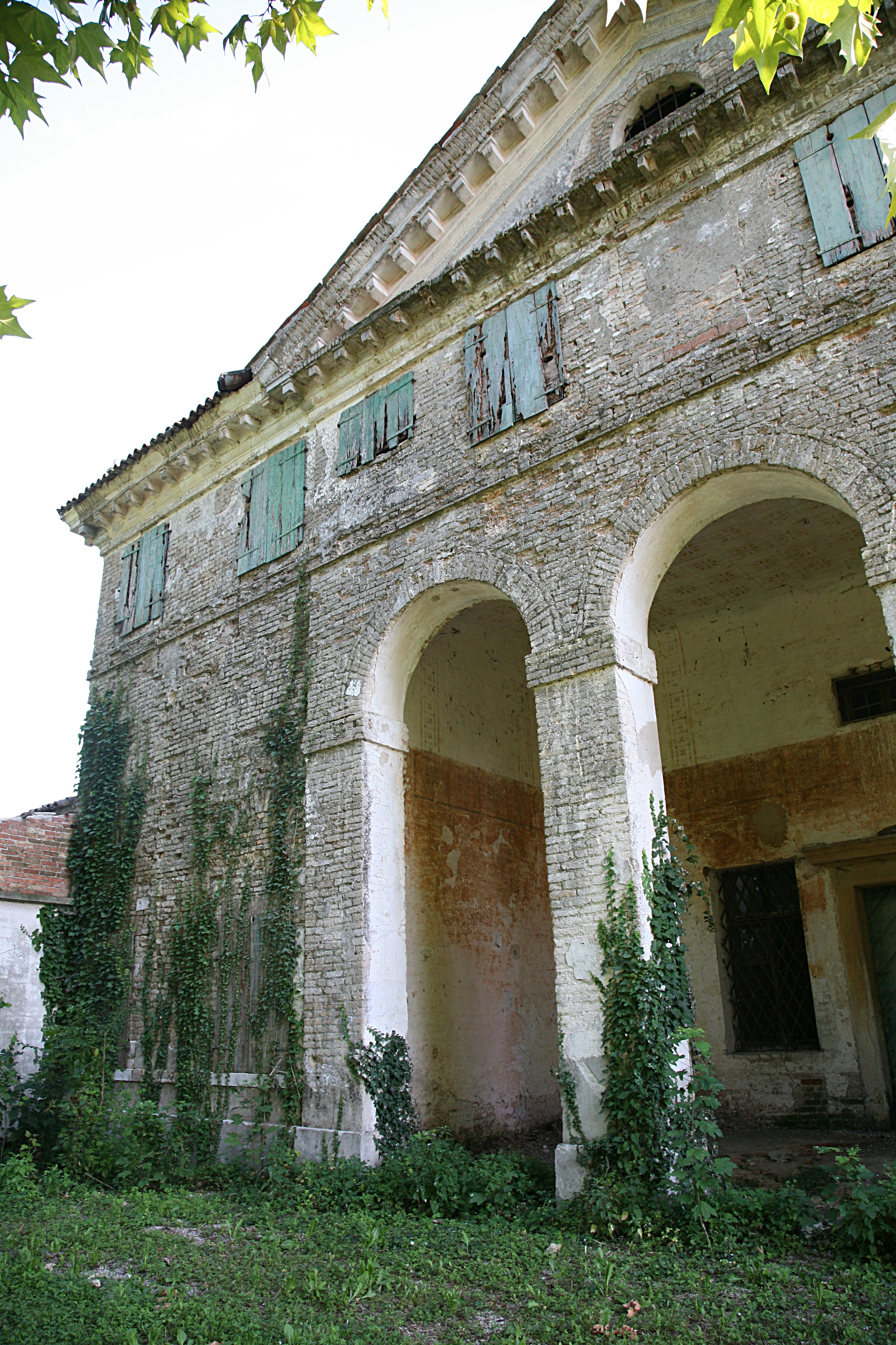 Villa Zeno at Donegal di Cessalto by Andrea Palladio